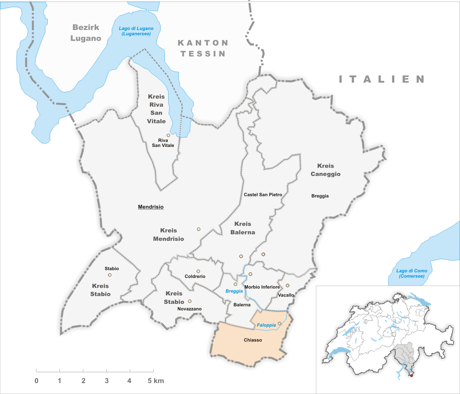 Municipality Chiasso